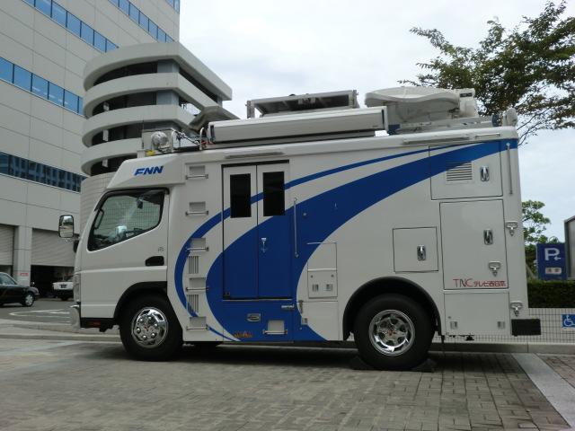 福岡のTNCの中継車です。